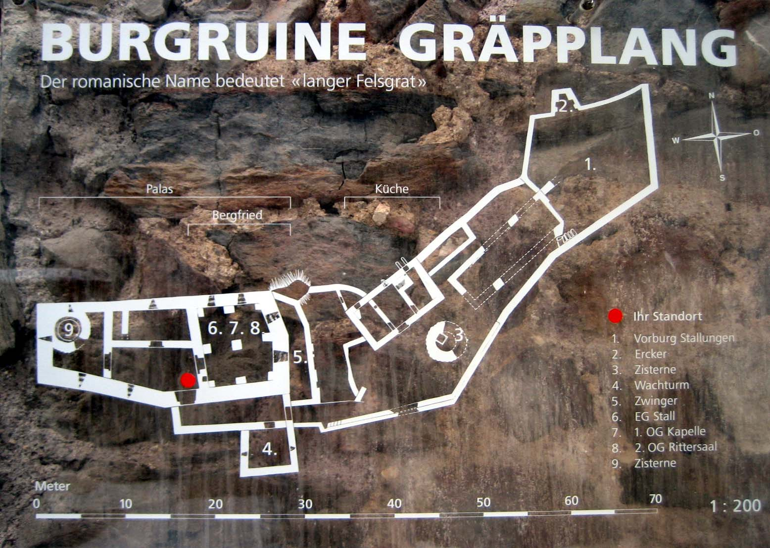 Orientierungstafel in Gräpplang